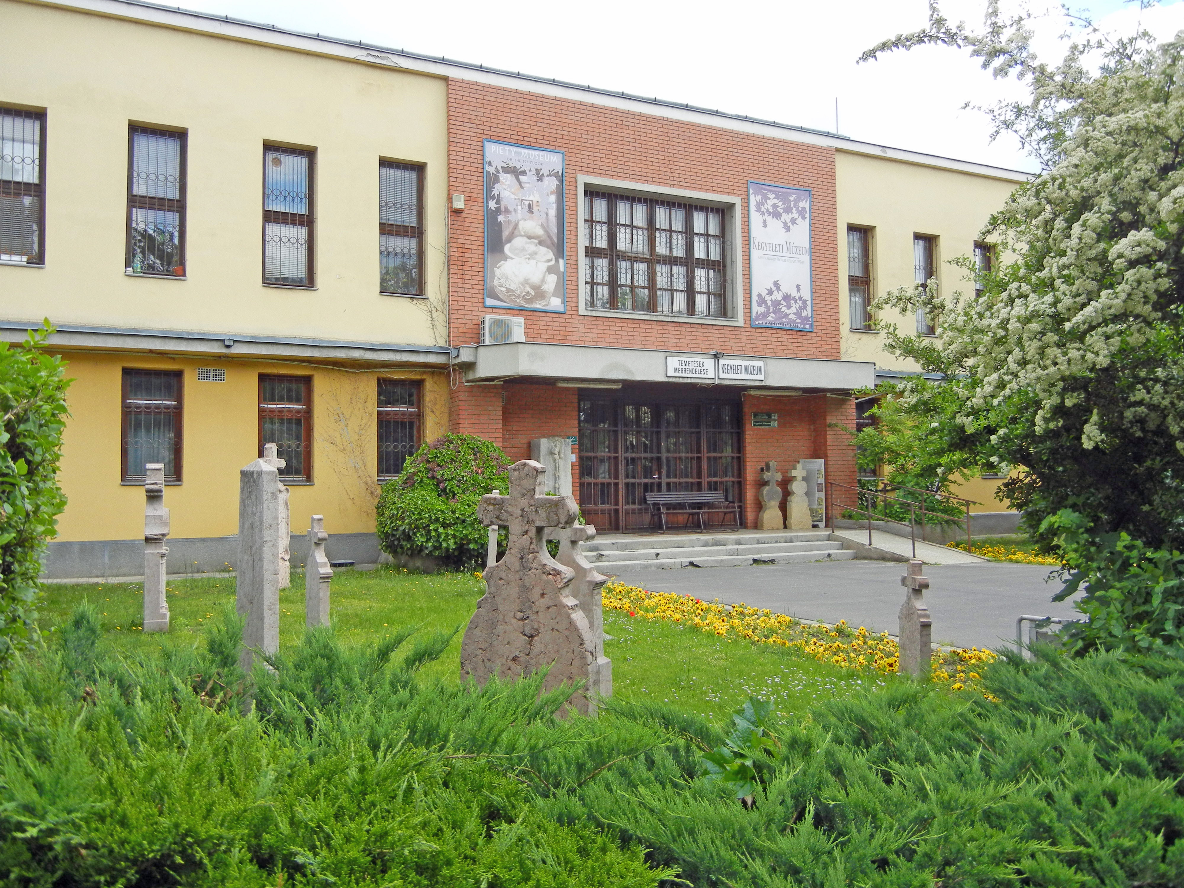 Budapest, Cimetière national de Fiumei út (Fiumei úti Nemzeti Sírkert) ou cimetière Kerepesi (Kerepesi temető) est le plus célèbre cimetière de Budapest